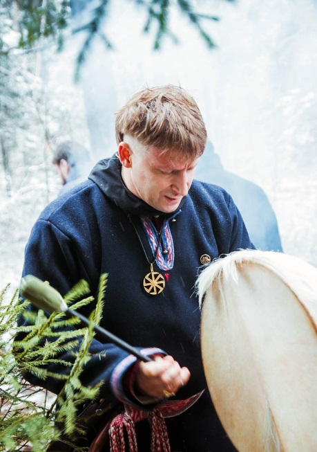 Volkhv of the Union of Slavic Rodnover Communities (Союз Славянских Общин Славянской Родной Веры).